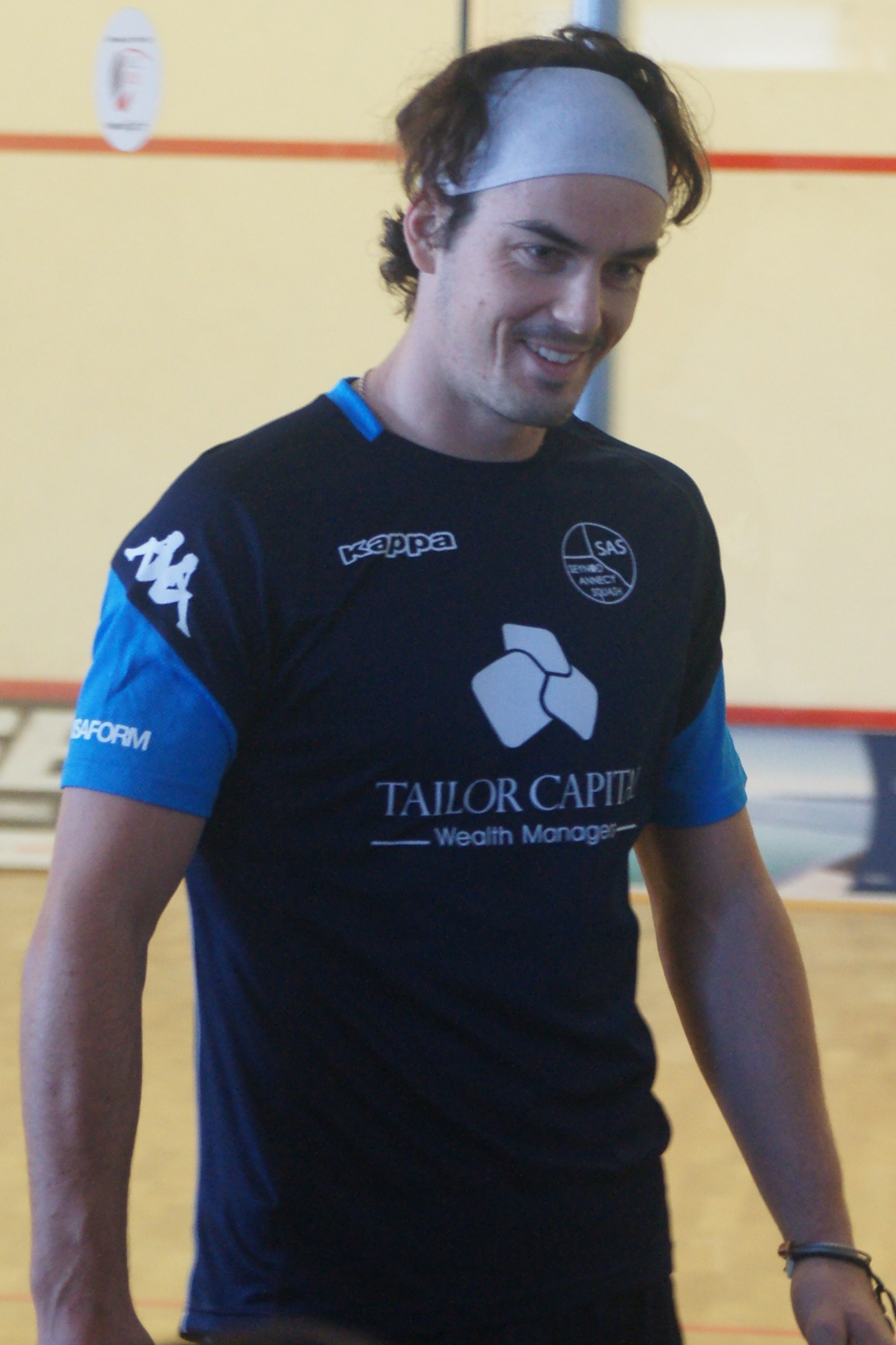 Paul Coll, Antibes 2018